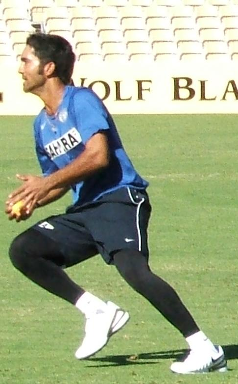 Dinesh Karthik at Adelaide Oval